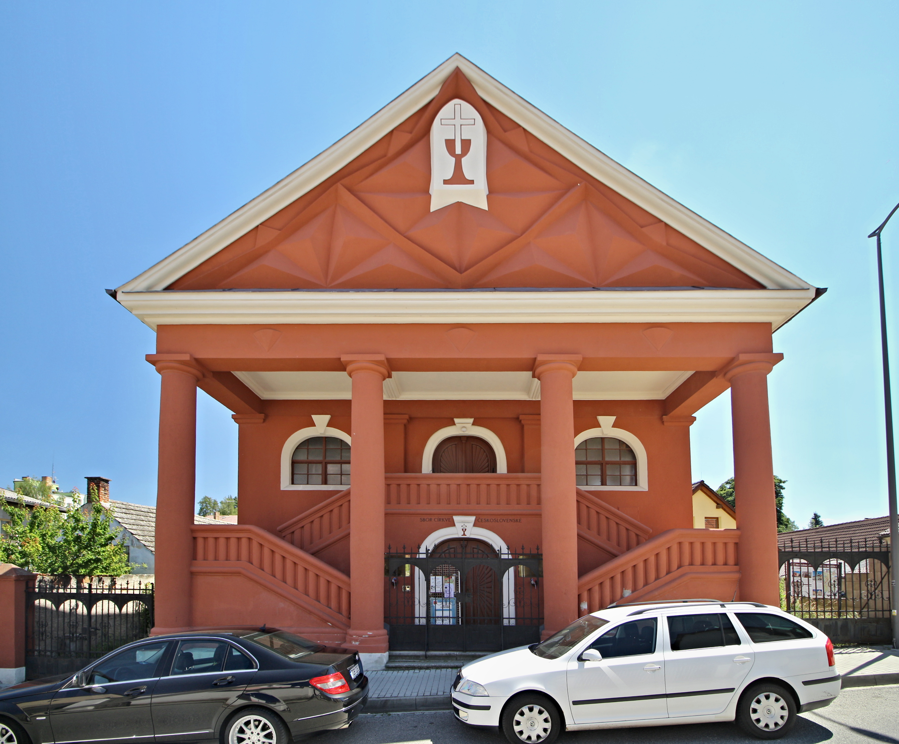 Nová synagoga v Milevsku, dnes Husův sbor